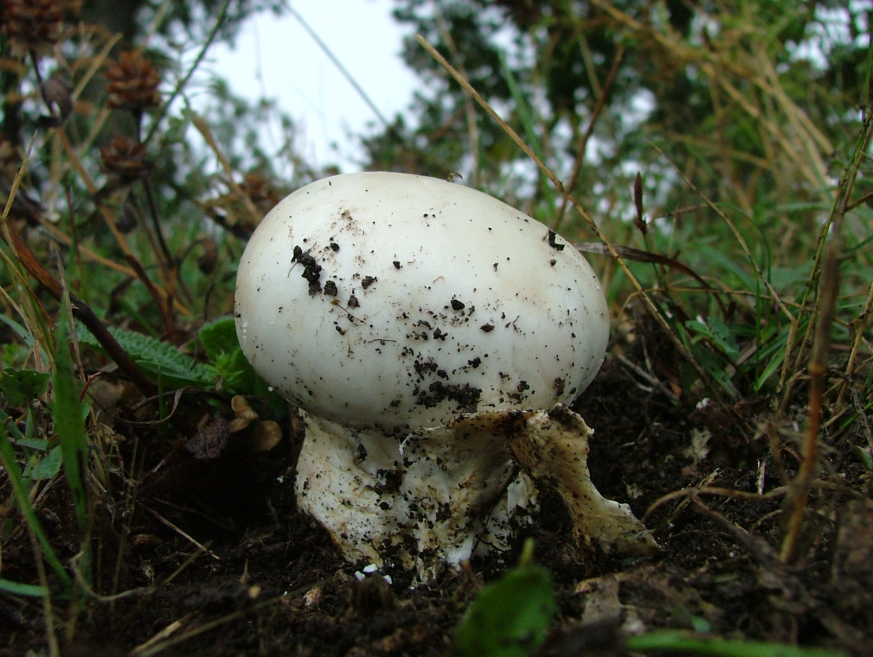 Autore: Rocco Stasi. Fonte: fatta da me. Amanita ovoidea ritrovata in un parco alla periferia di Tricarico GFDL, sono l'autore.